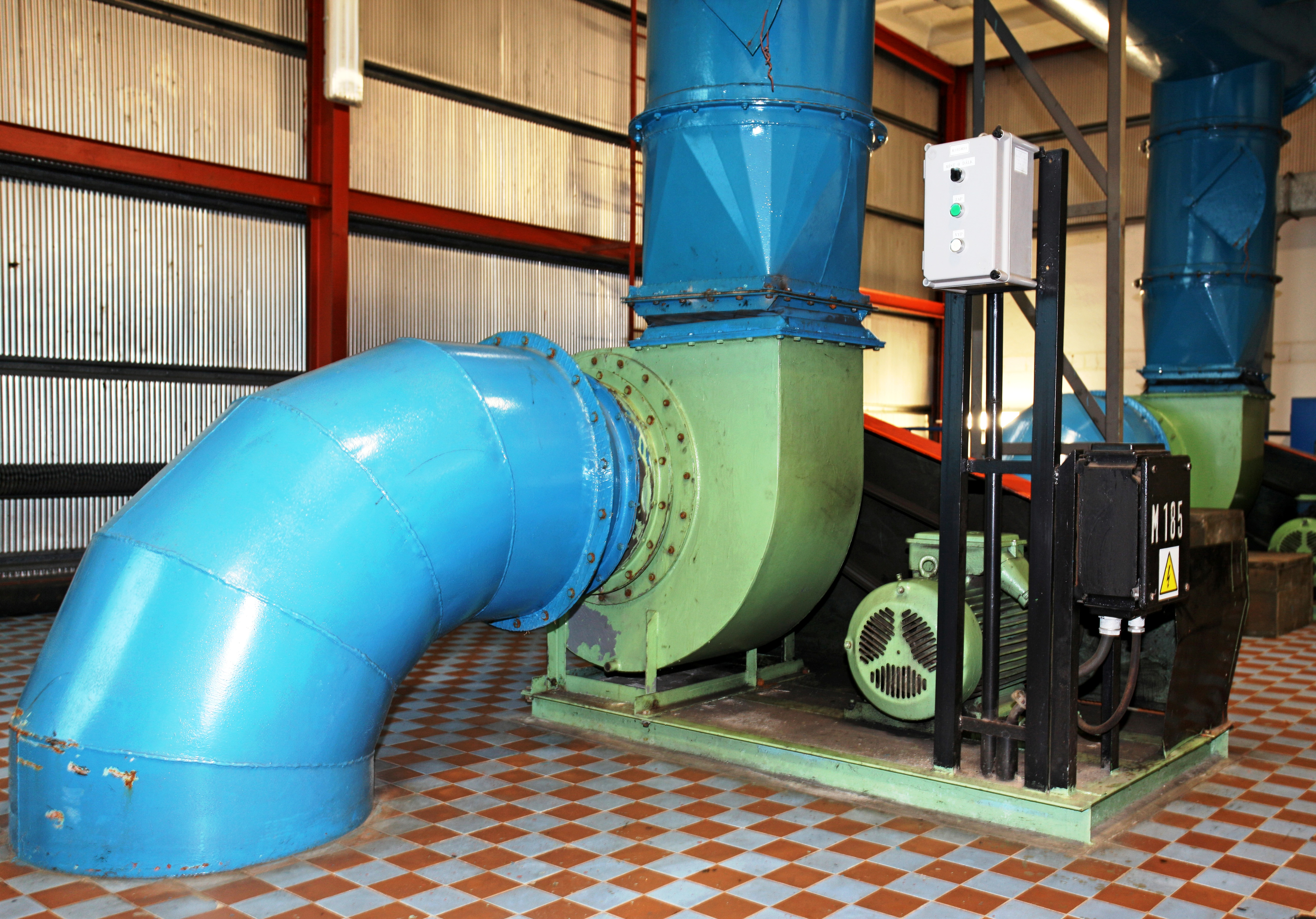 Vzduch je modrým potrubím poháněn turbínou s elektrickým motorem. Trubky přihánějí vzduch do van aerační místnosti v odželezovně v úpravně vod v Káraném. Vzduch probublává tenkou vrstvičkou vody a zajišťuje tak přeměnu rozpuštěného trojmocného železa na dvojmocné a jeho vyvločkování. Vločky železa je pak možno následně zachytit pískovým filtrem. Při aeraci vody se též z vody odstraní různé plyny. Nová odželezovna artéské vody funguje v úpravně vody Káraný od roku 1978. Artéská voda je jímána ze 7 vrtů o hloubce 60-80 m východně od obce Káraný a násoskou (= vzduchotěsné potrubí dopravující vodu, díky podtlaku tvořenému vývěvou) přiváděny do odželezovny v úpravně vod Káraný. Tato voda pochází ze zvodně (= souvislá akumulace podzemní vody v propustném horizontu) cenomanských (= časová jednotka svrchní křídy vymezující období před 99,6-93,5 miliony let) pískovců o mocnosti 20-30 m překrytých vrstvou nepropustných slínovců. Označení artéská voda pochází z francouzské provincie Artois, kde byla obdobná voda čerpána mnichy kartuziánského řádu ve 12. století. Voda do Polabí přitéká propustnými pískovci shora od Ještědského hřbetu. Rychlost je však malá, stáří vody bylo odhadnuto na 14 000 let. Zdroje: Křivánek, Oldřich a Kněžek, Miroslav. 2001. Zdroje pitné vody v Káraném. Principy získávání vody v oblasti káranské vodárny. Pražské vodovody a kanalizace a.s. Wikipedie Ambrožová, Jana. 2007. Aplikovaná a technická hydrobiologie. VŠCHT